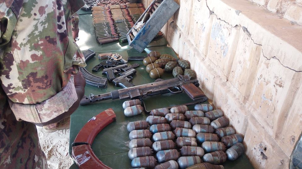 En images : découverte d'un lot d'armes dans la ville de Tombouctou au Mali 08 septembre 2016 À Tombouctou, au Mali, les autorités ont fait part de la découverte d’un important lot d’armes de guerre et de munitions. Cette découverte a été rendu possible grâce au concours de la population locale qui a informé la gendarmerie de la ville, d’un mouvement suspect au niveau d’un bâtiment inhabité. Après une semaine d’enquête, les gendarmes ont trouvé un véritable arsenal de guerre.